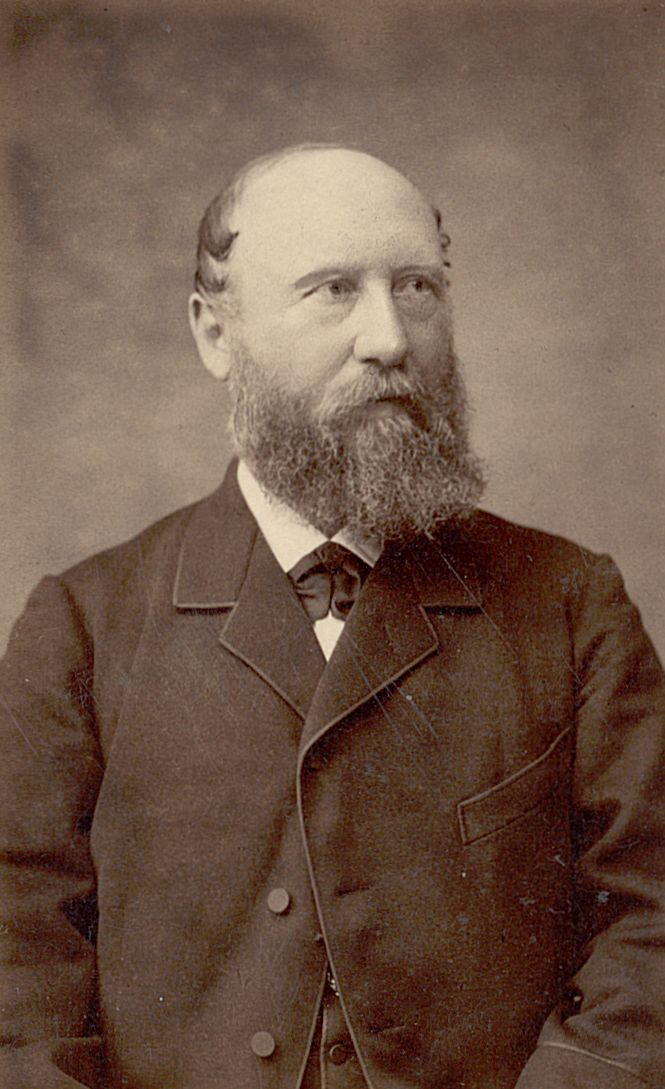 Foto von Georg August Wintterlin